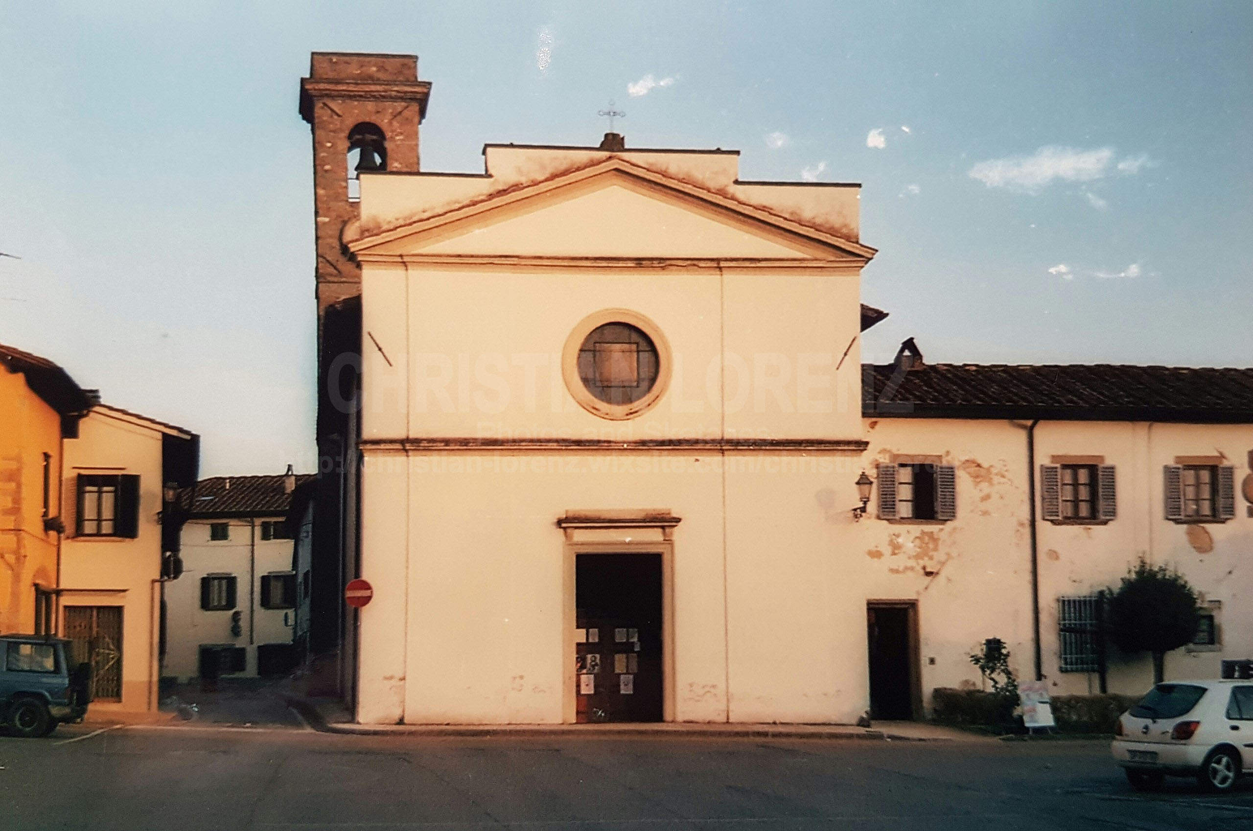 Pieve di San Bartolomeo in via della chiesa.